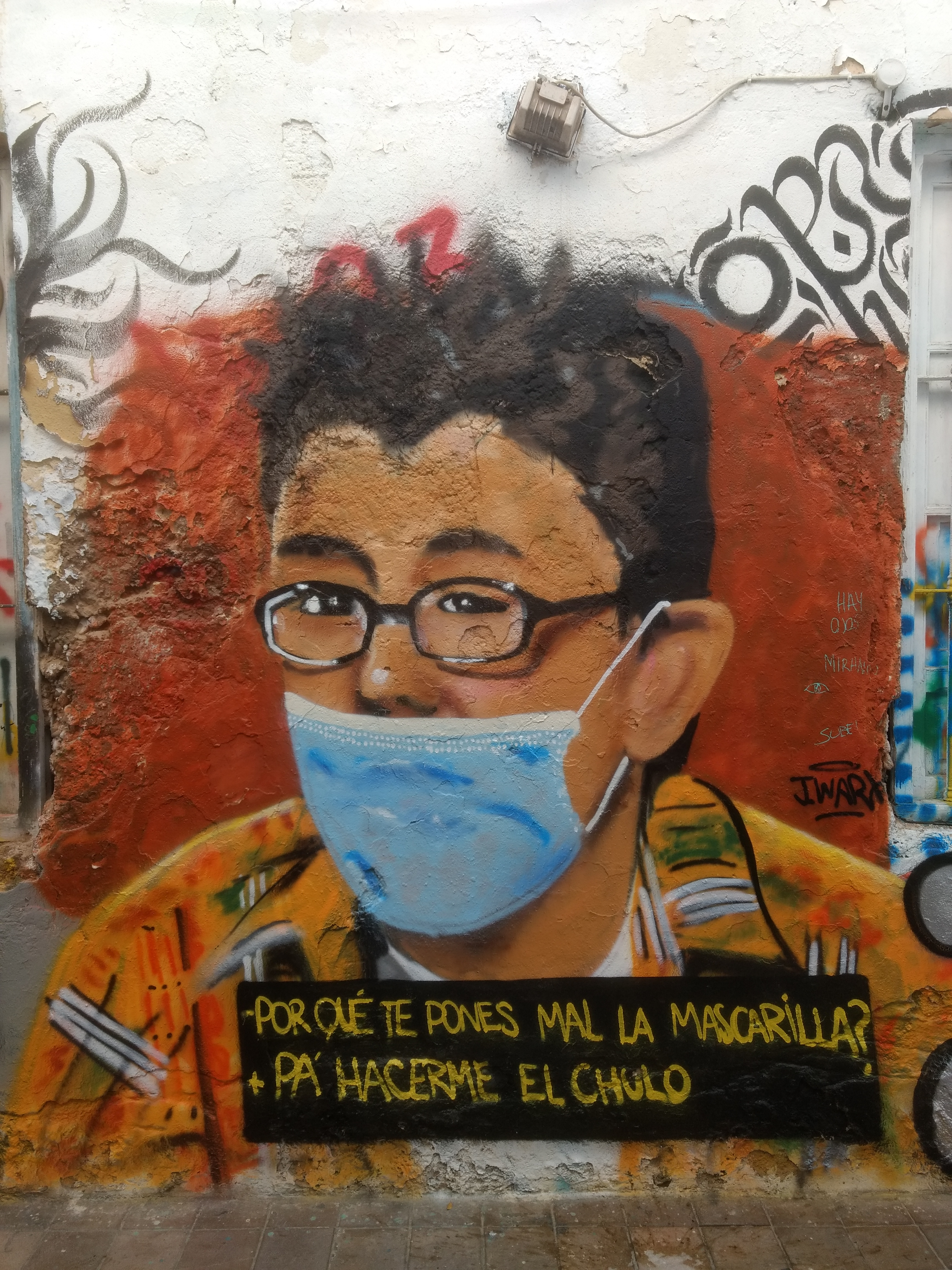 Mural de J. Warx sobre el coronavirus